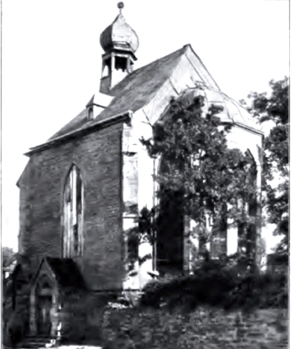 Soest, Brunsteinkapelle, Südostansicht